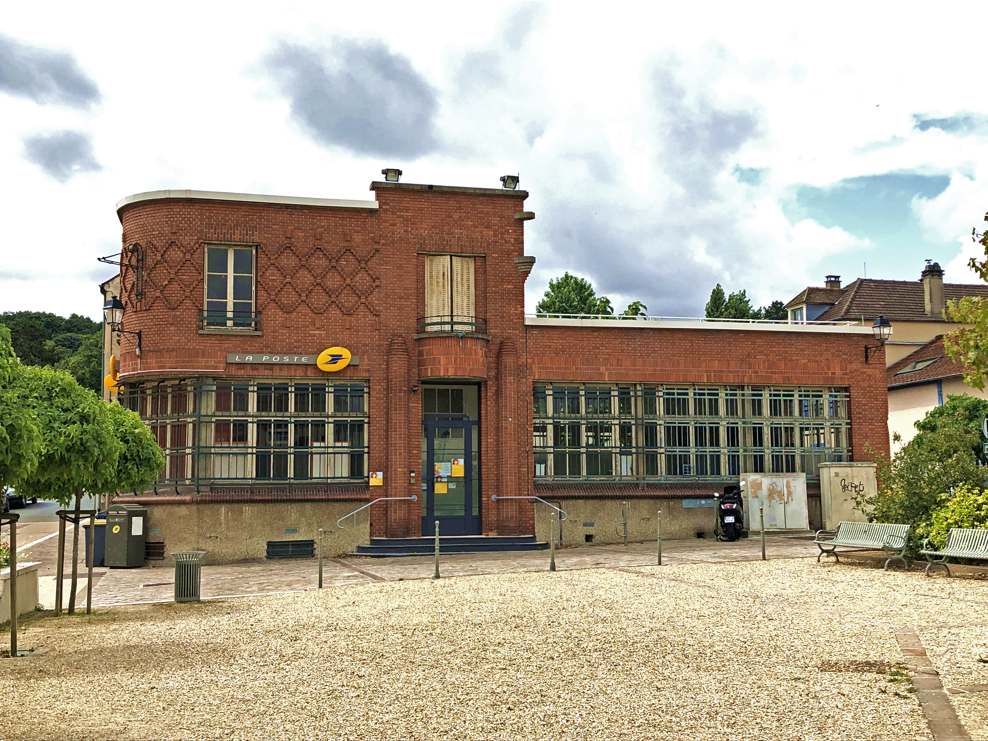 La Poste de Louveciennes